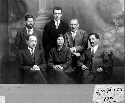 Mymon_095 / עדה יושבת במרכז, פרג כ"ה ניסן תר"פ 1920 - עדה מימון